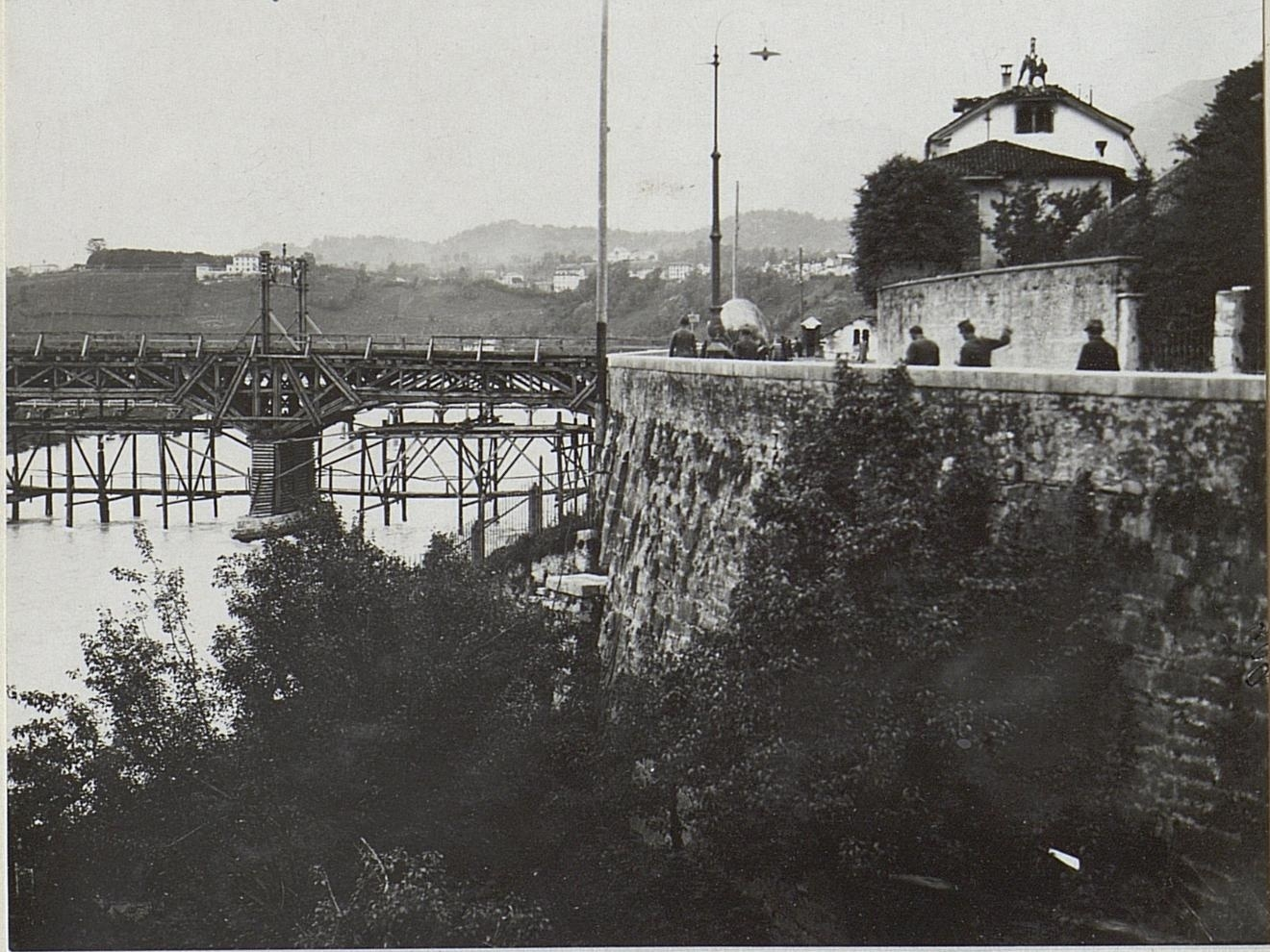 Belluno, Piavebrücke.